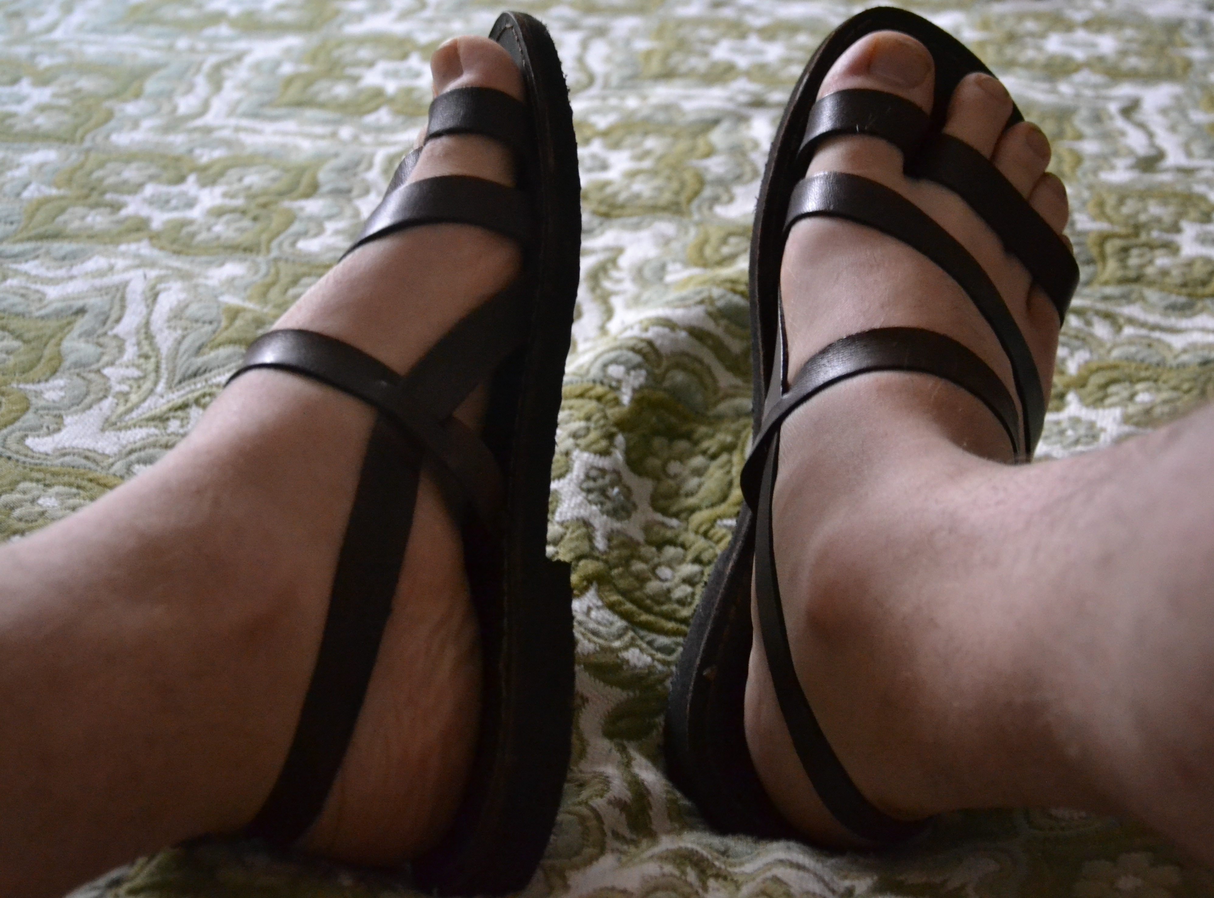 Sandali maschili di pelle (Sandalishop)